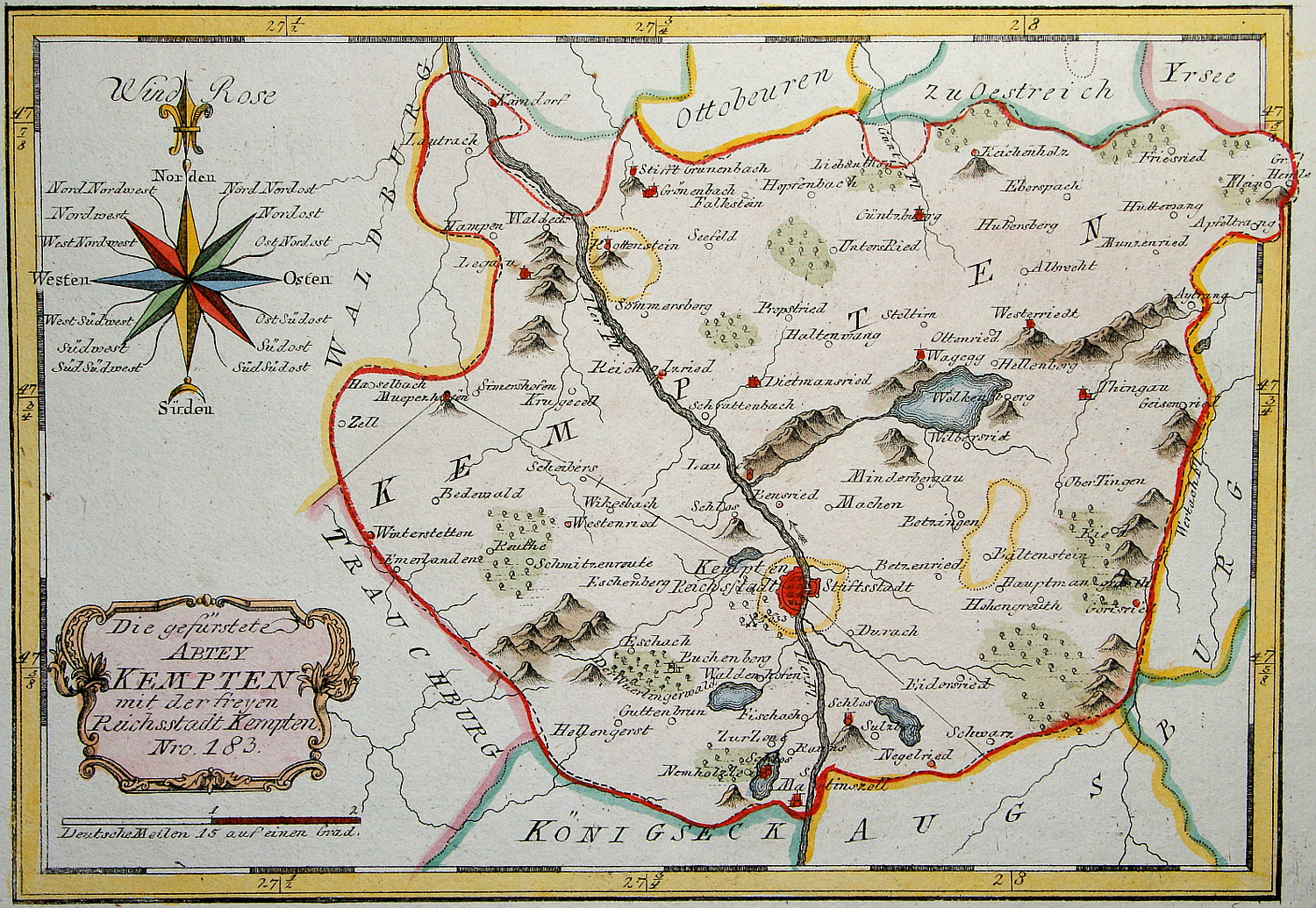 Die gefürstete Abtey Kempten mit der freyen Reichsstadt Kempten.